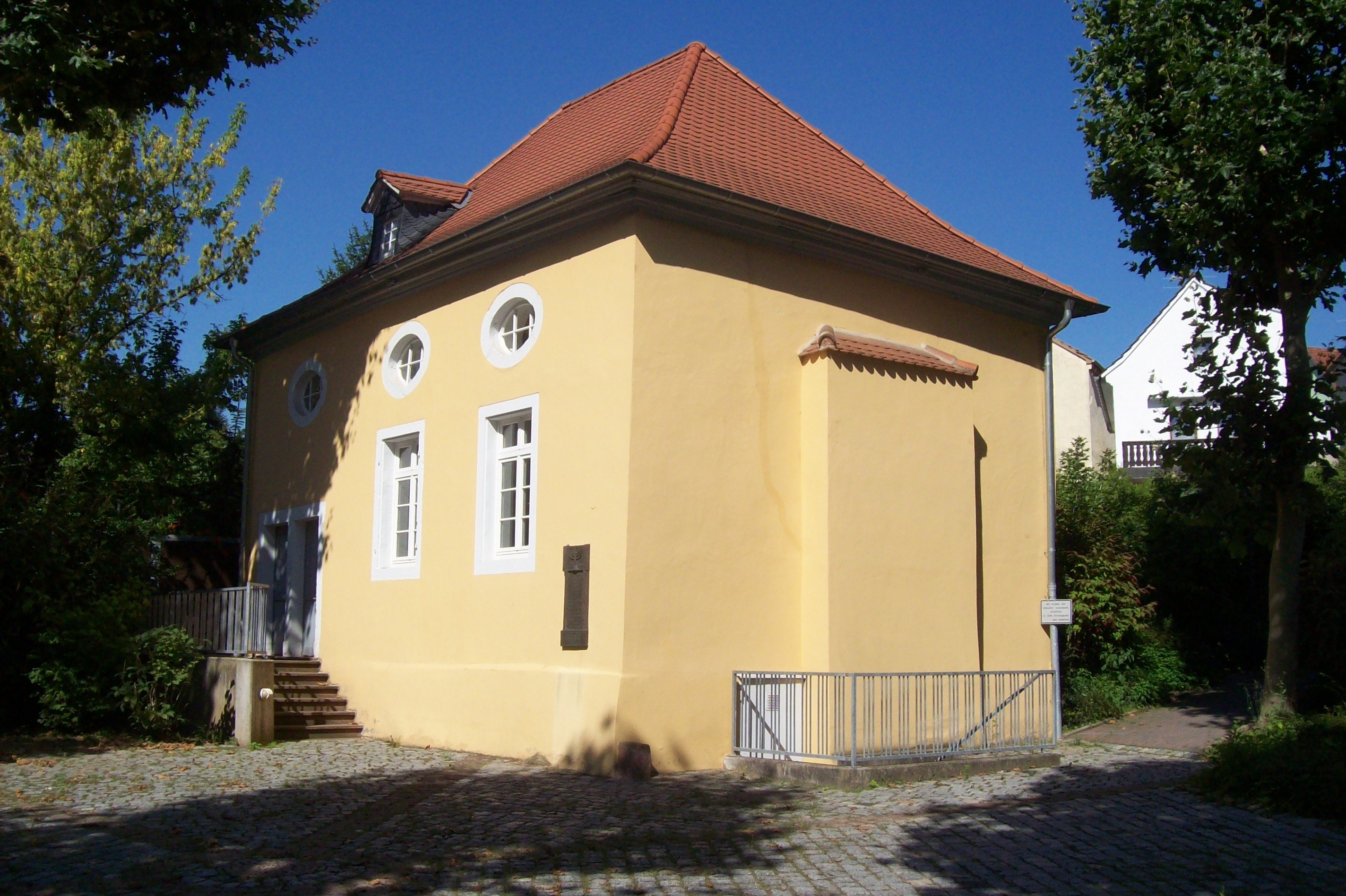 Die ehemalige Synagoge von Bensheim-Auerbach, Hessen, Deutschland